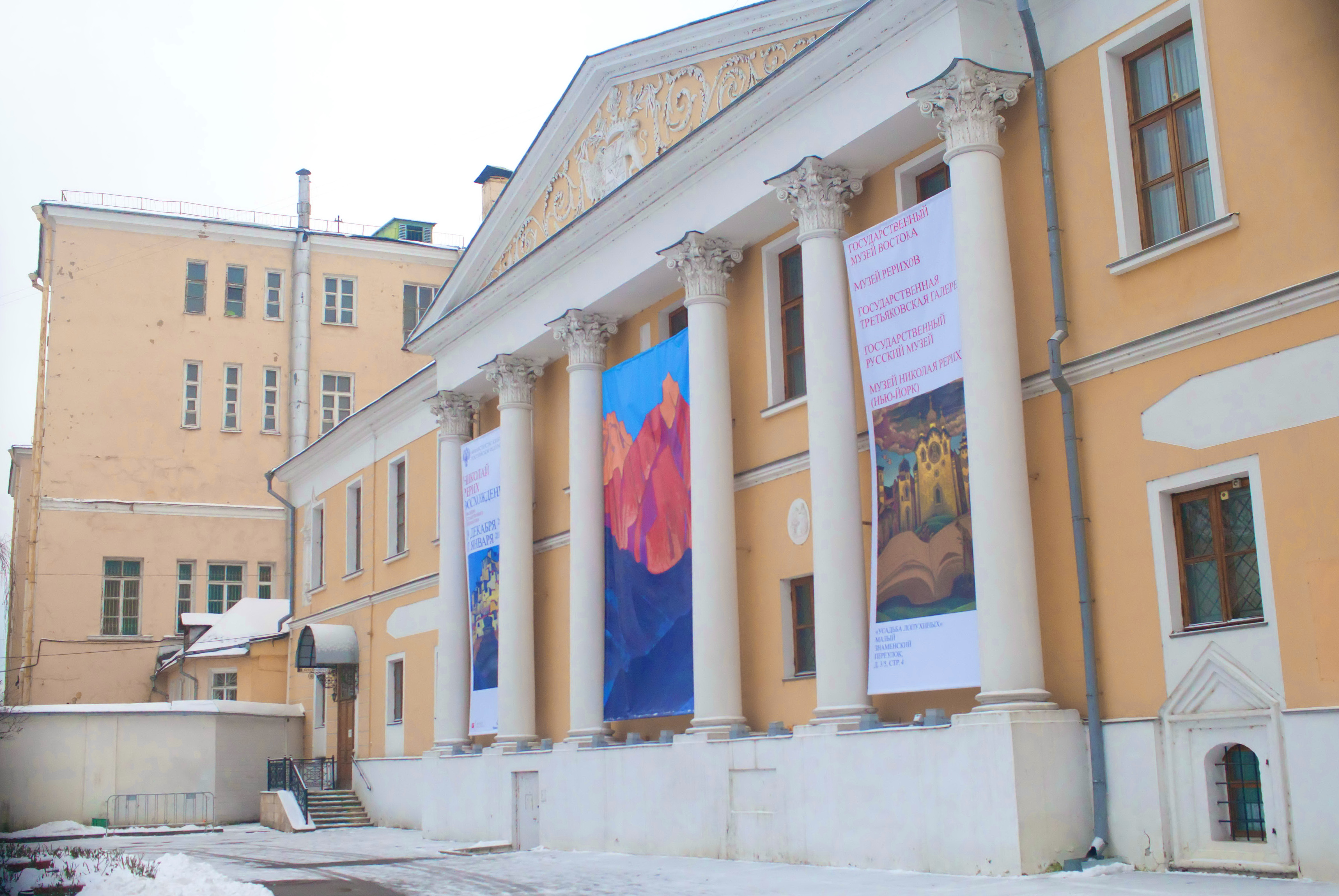 Выставка "Николай Рерих. Восхождение" в Музее Рерихов (Усадьба Лопухиных, Малый Знаменский переулок, д.3/5, стр.4; 20 декабря 2017 – 17 января 2018)